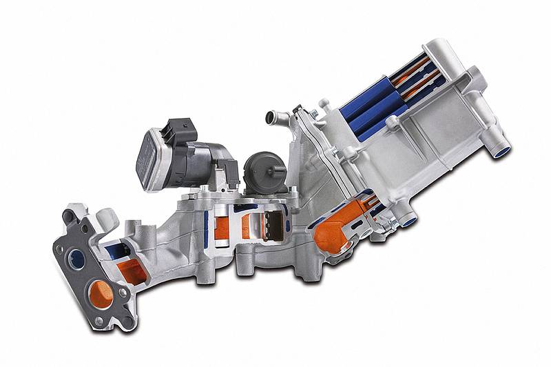 Abgasrückführung mit integriertem Alu-Druckgusskühler